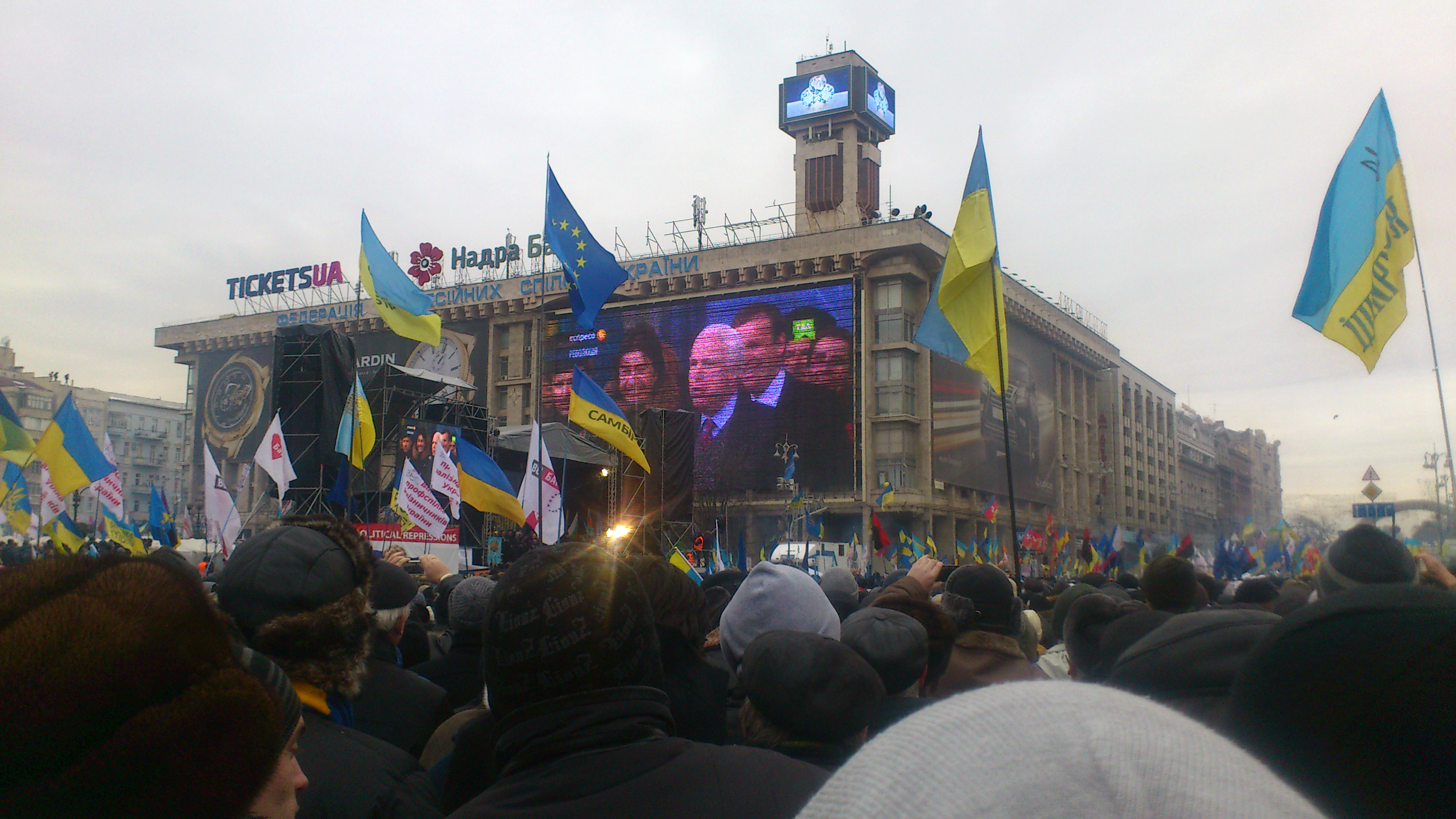 Маккейн на Євромайдані: Сенатор-республіканець Джон Маккейн заявив на майдані Незалежності про підтримку Євромайдану: «Я кажу сьогодні всім українцям: Америка з вами».